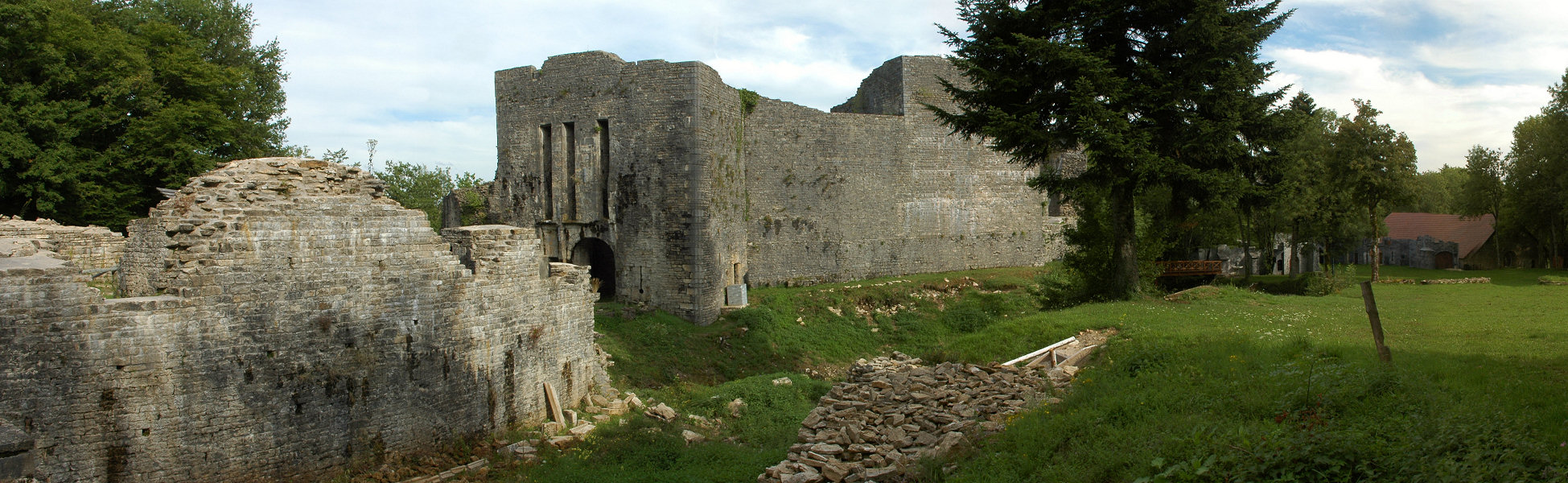 Château de Présilly, (Classé, 1955) .